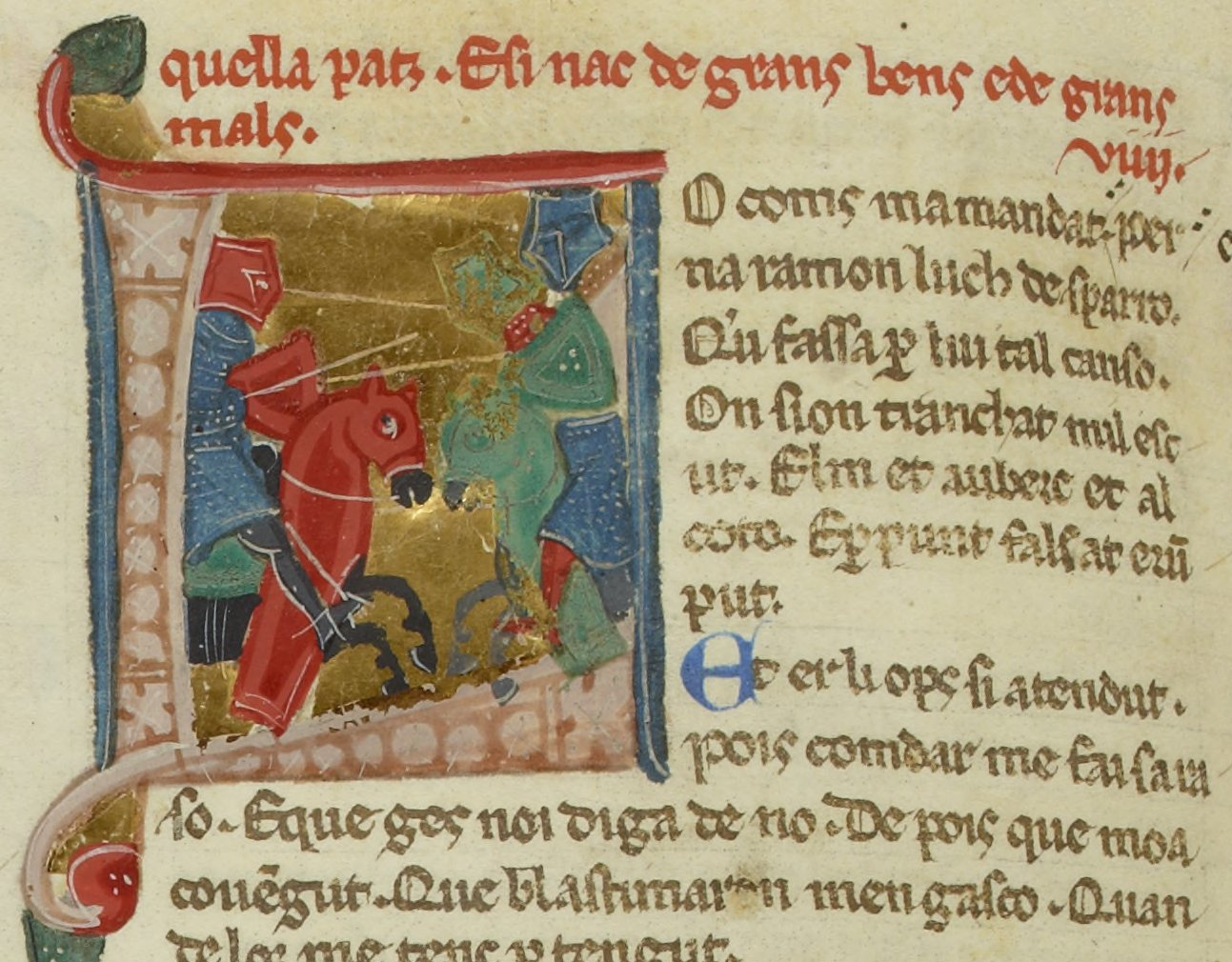 Lo coms m'a mandat e mogut – sirvente by Bertran de Born. Pillet’s № 80, 23. Manuscript № 9 (VIIII), f. 174v; Bibliothèque nationale de France